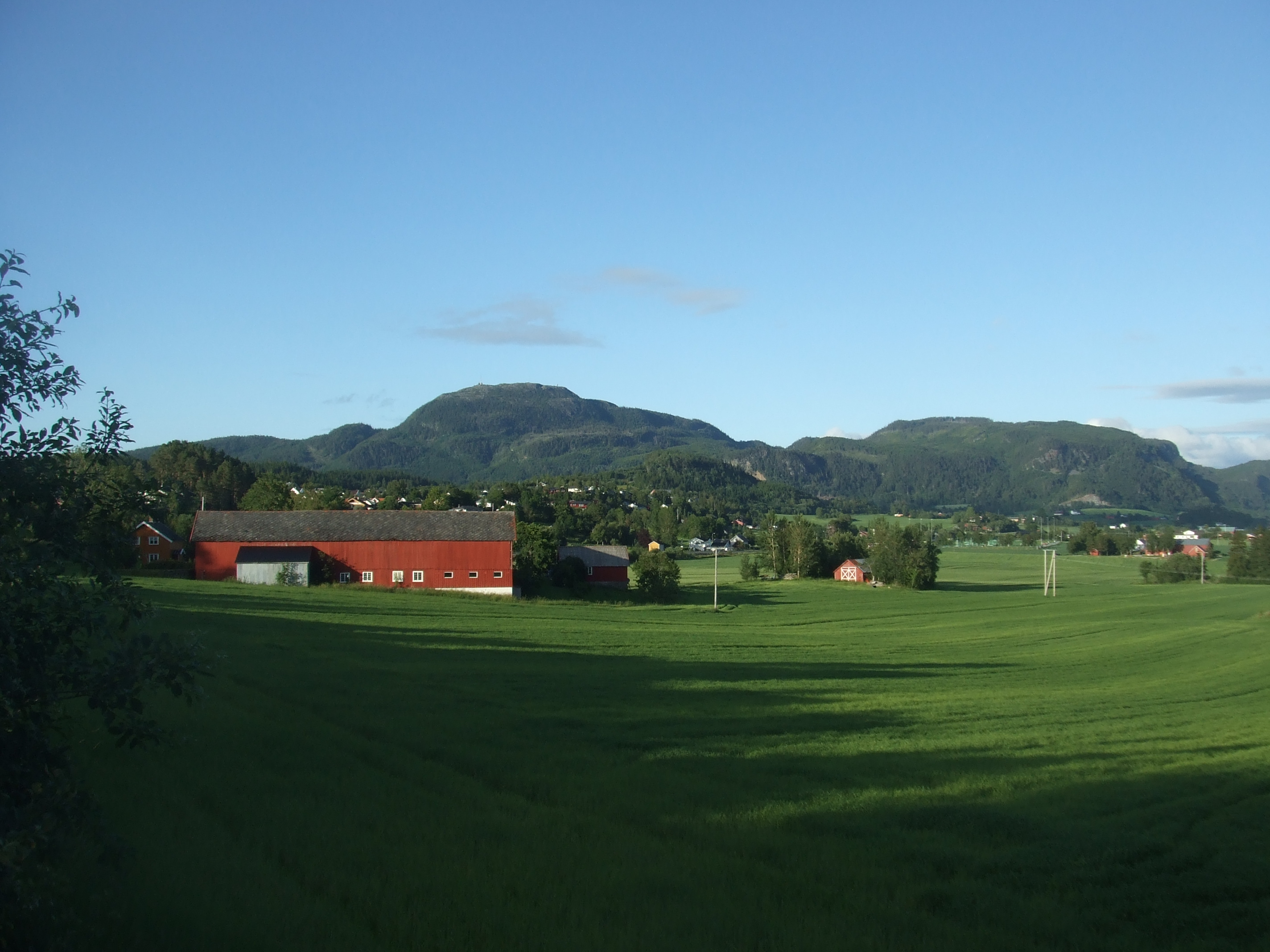 Deler av Midtbygda og Skatval sentrum sett fra sørøst.